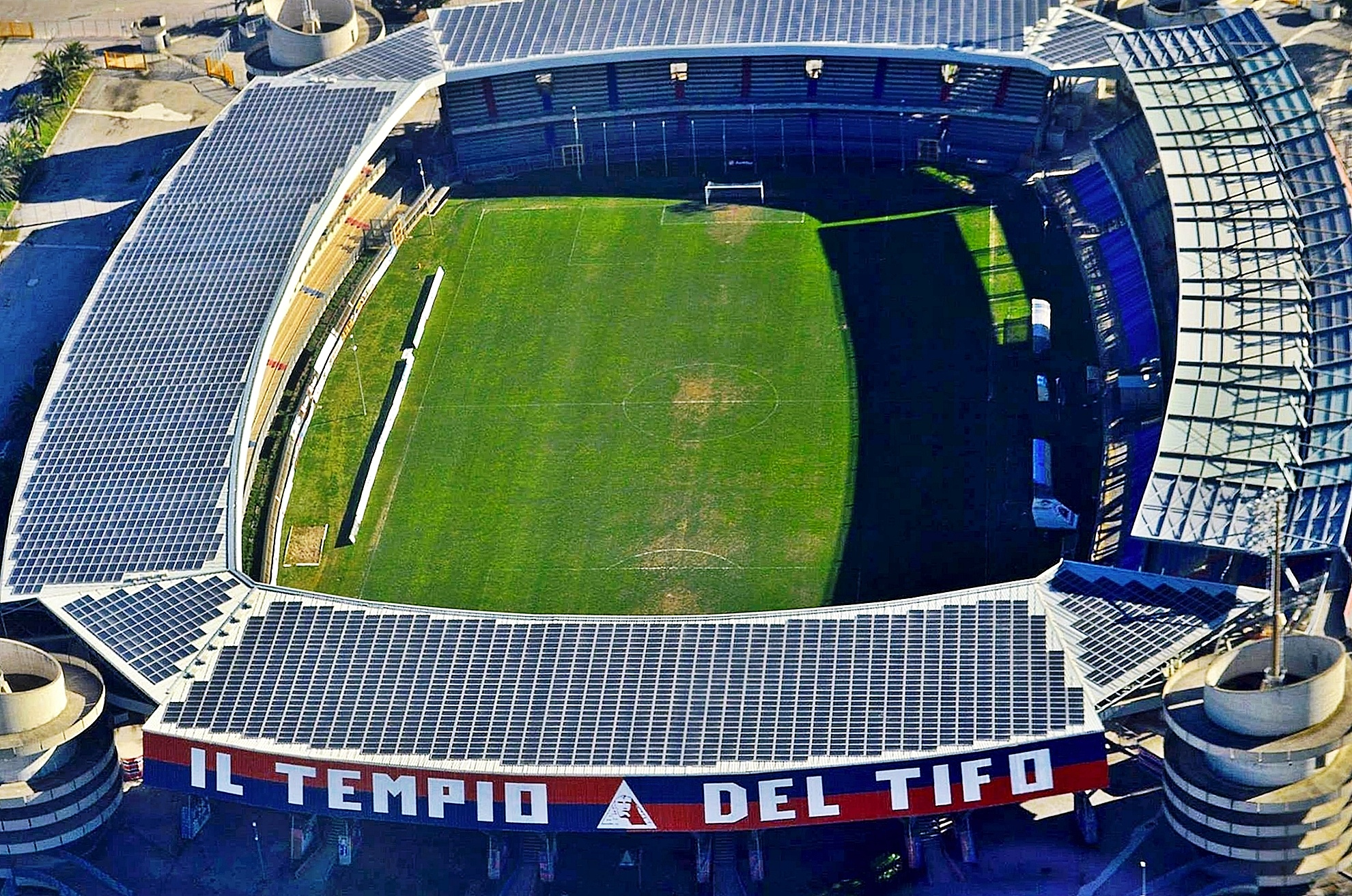 San Benedetto del Tronto, Veduta aerea dello stadio Riviera delle Palme